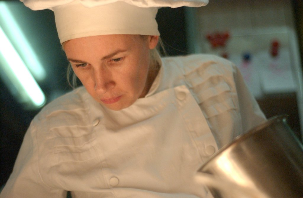 Hélène Darroze - Grand chef cuisinier gastronomique de Paris